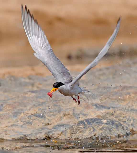 River Tern Sterna aurantia, Bangalore, India